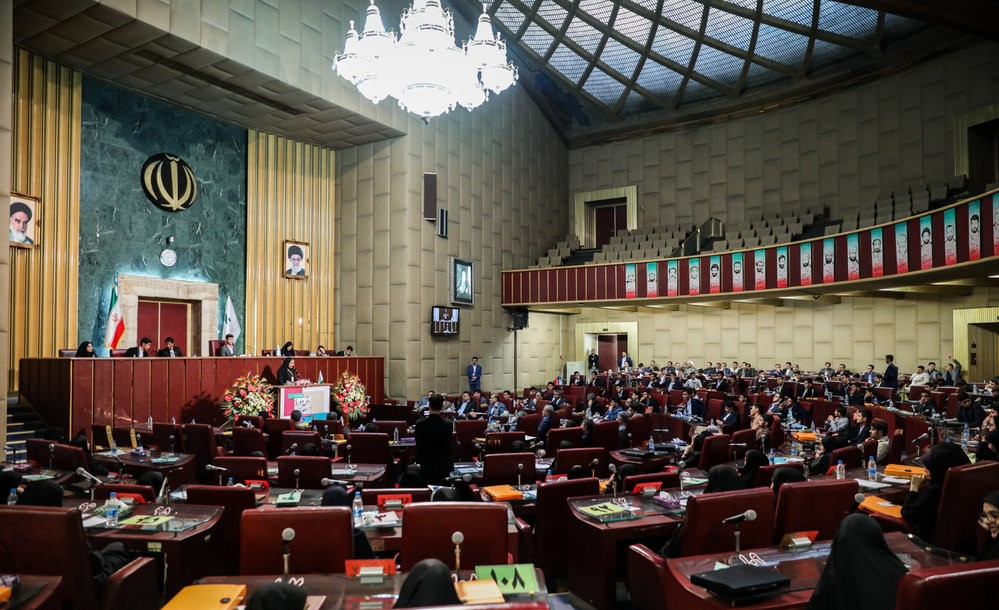 روز دوم از نهمین دوره مجلس دانش آموزی به ریاست هاشمی